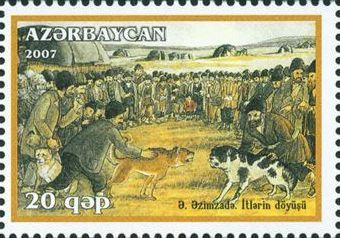 Rəssam Ə.Əzimzadənin əsəri